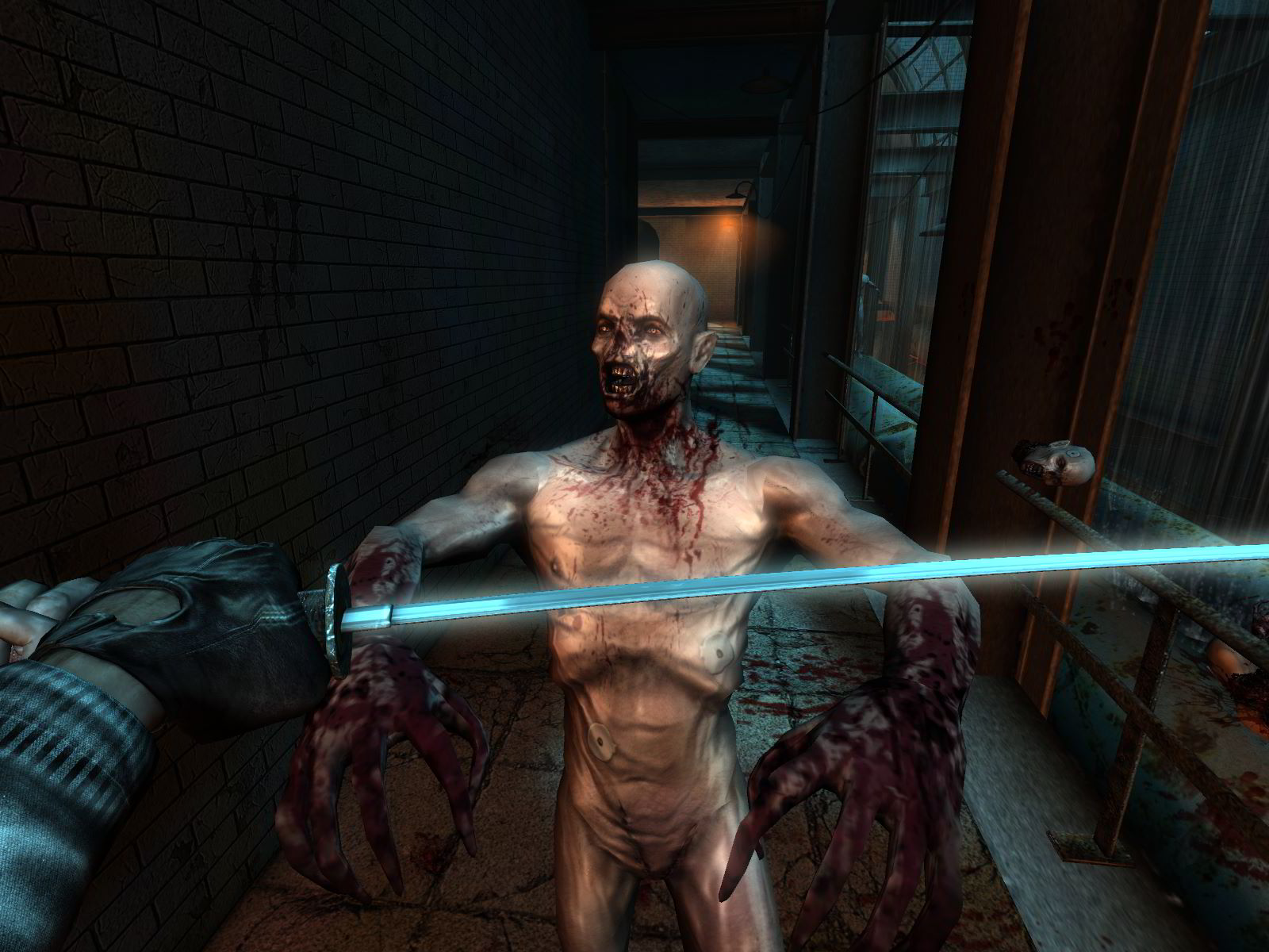 Action du jeu vidéo Killing Floor